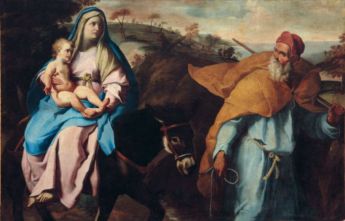 Fuga in Egitto, Convento di Sant'Angelo in Pescheria, Roma